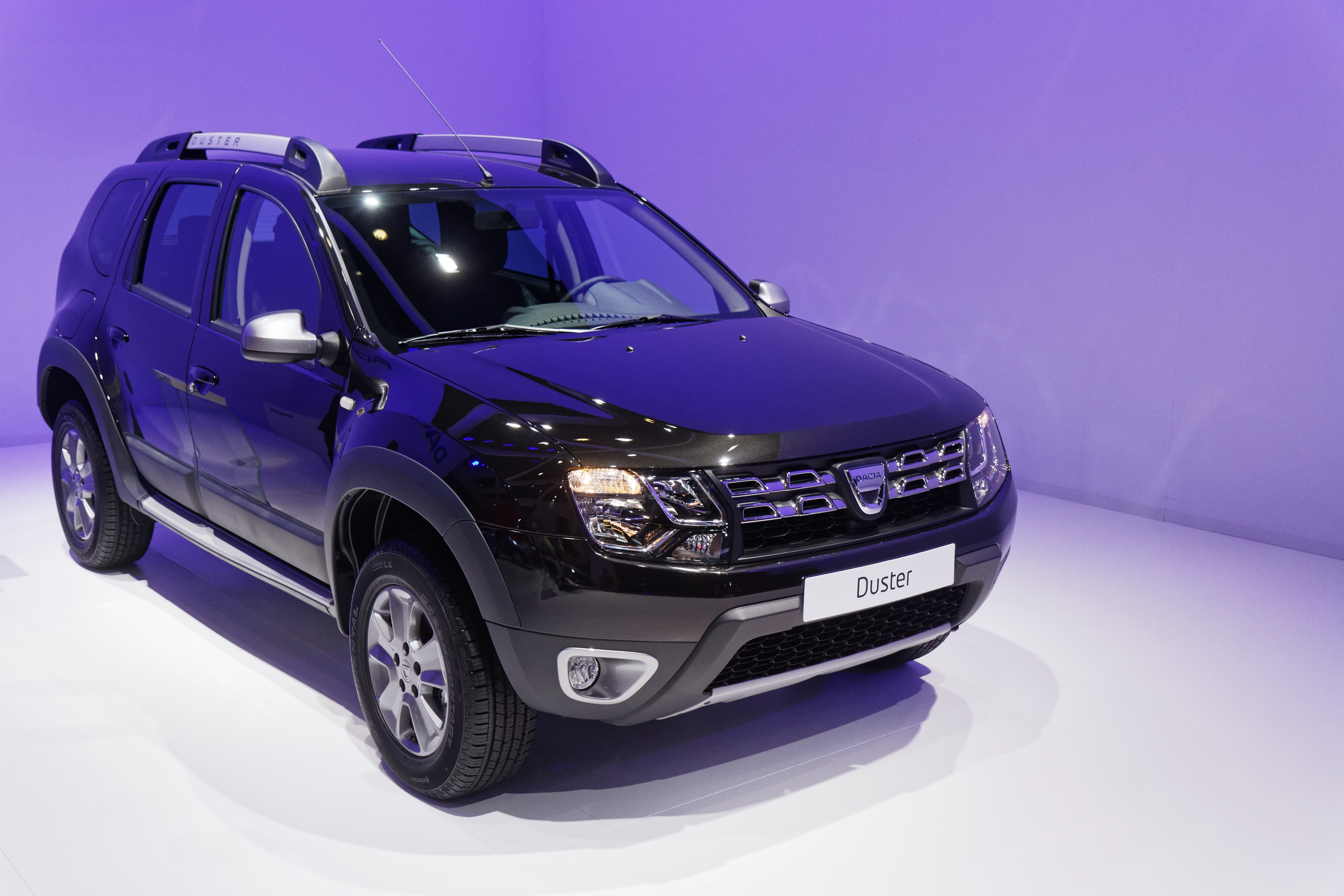 Une Dacia Duster présentée lors du mondial de l'automobile de Paris 2014.